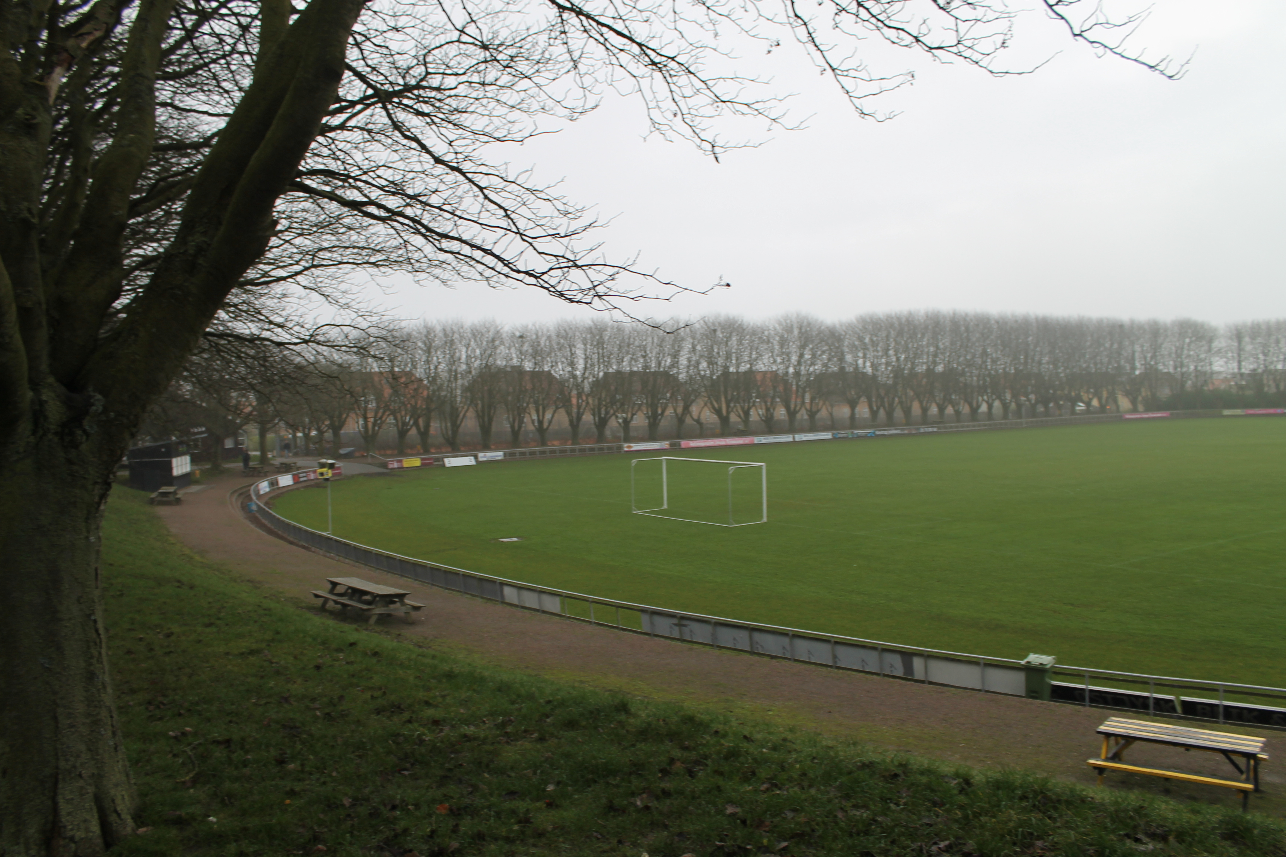 Riisvangen Stadion november 2012